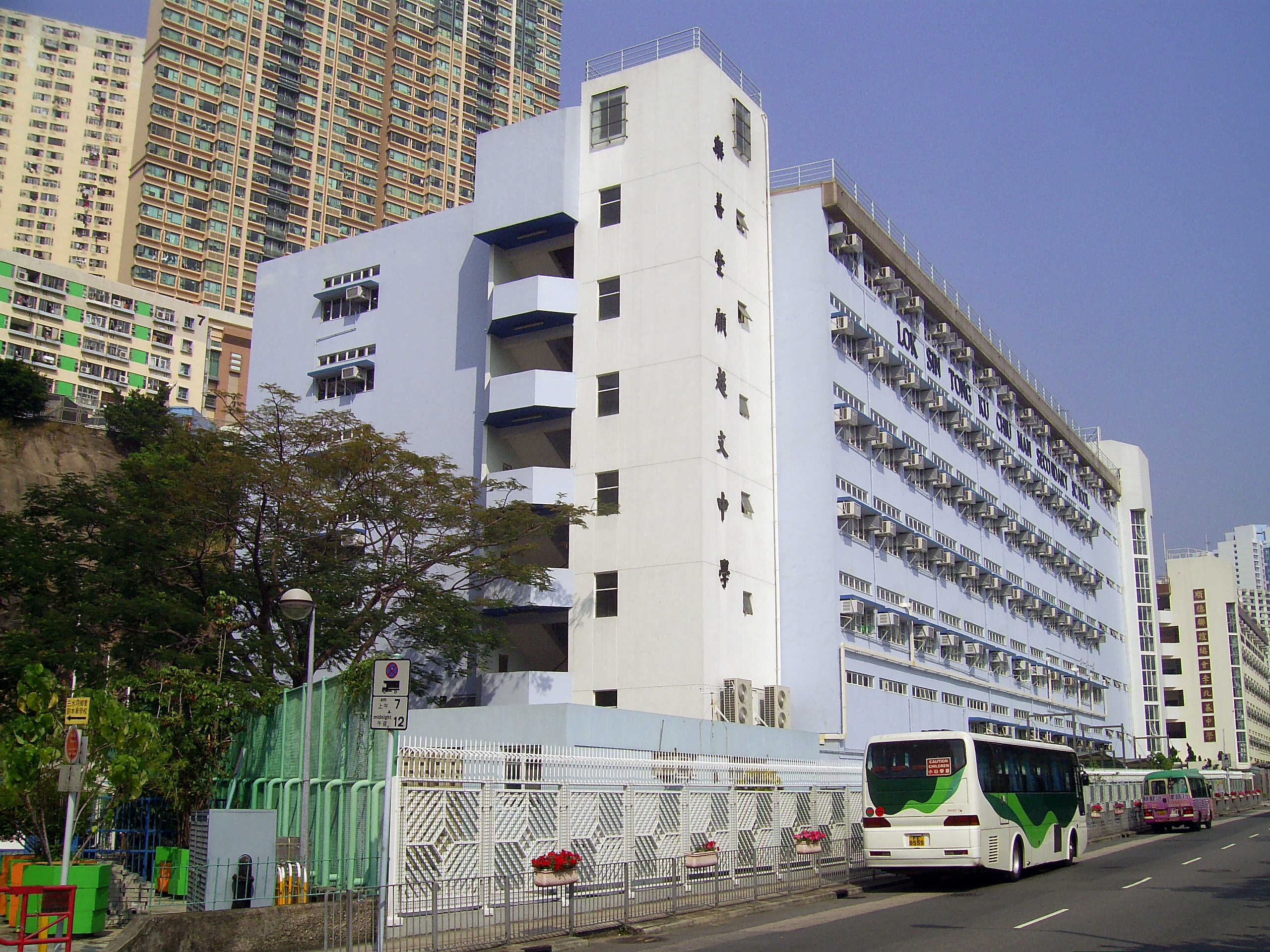 中文（香港）: 樂善堂顧超文中學